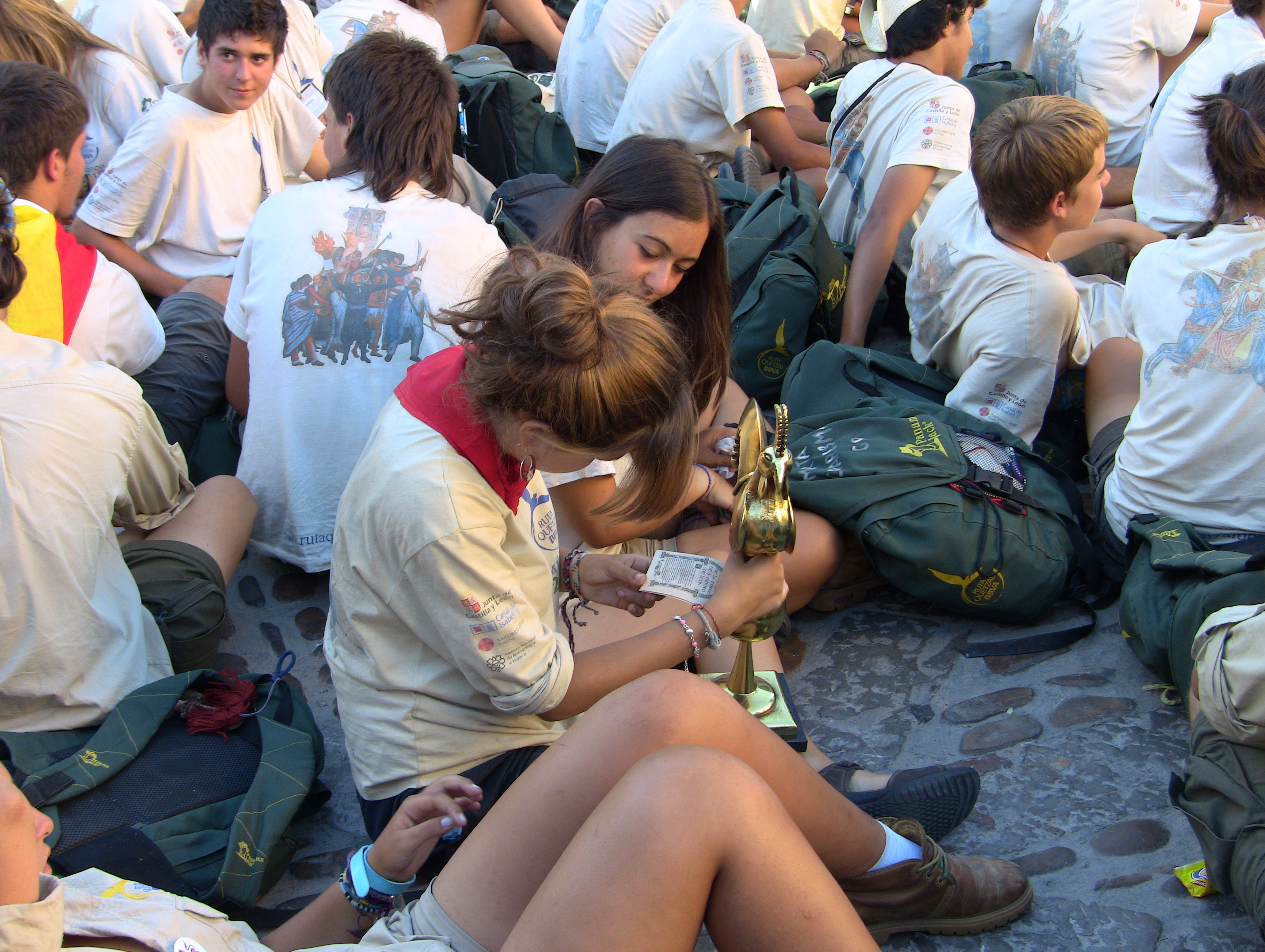 Expedicionarios de Ruta Quetzal 2010 frente a la Basílica de San Isidoro, en León.